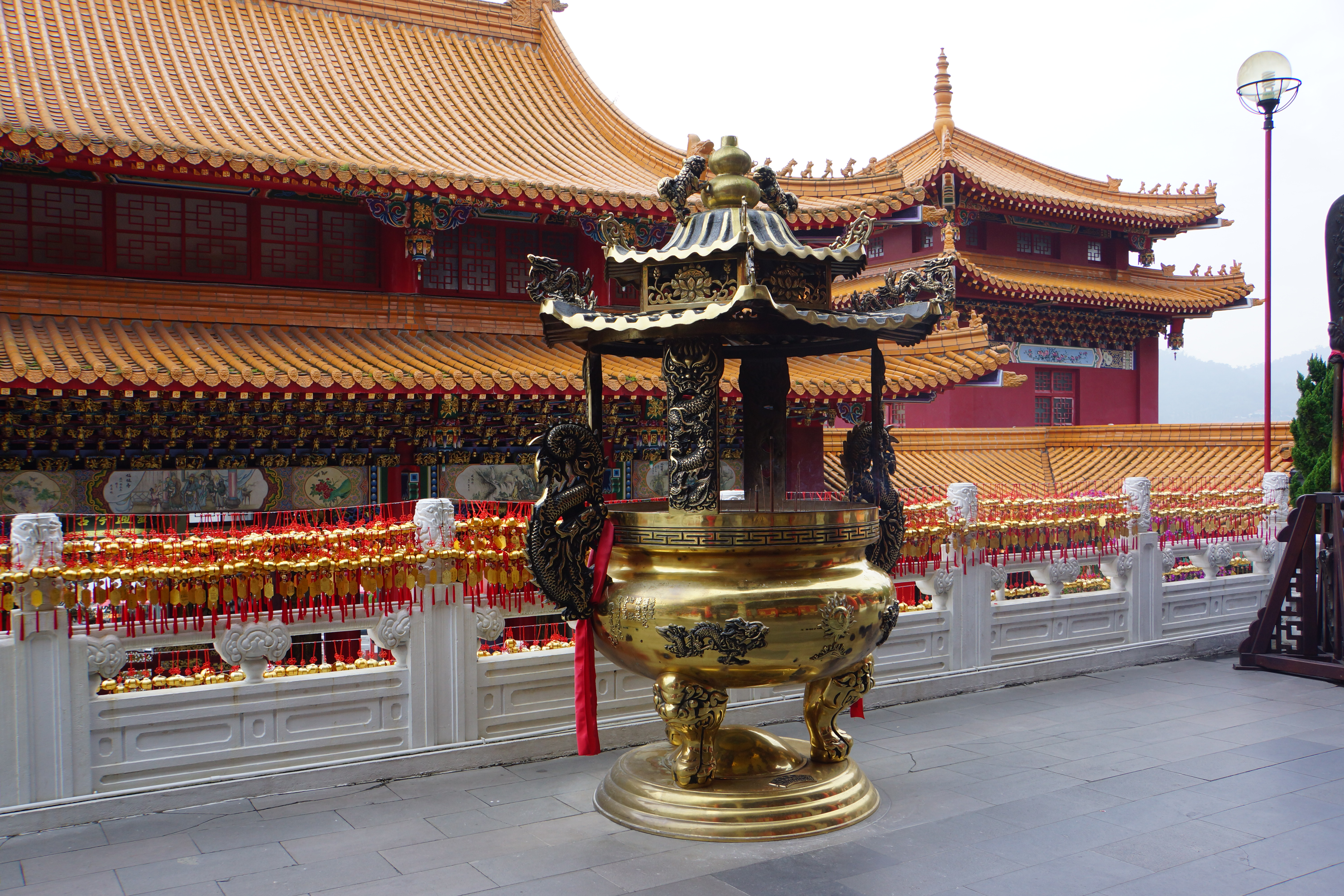 日月潭文武廟 Sun Moon Lake Wen-Wu Temple